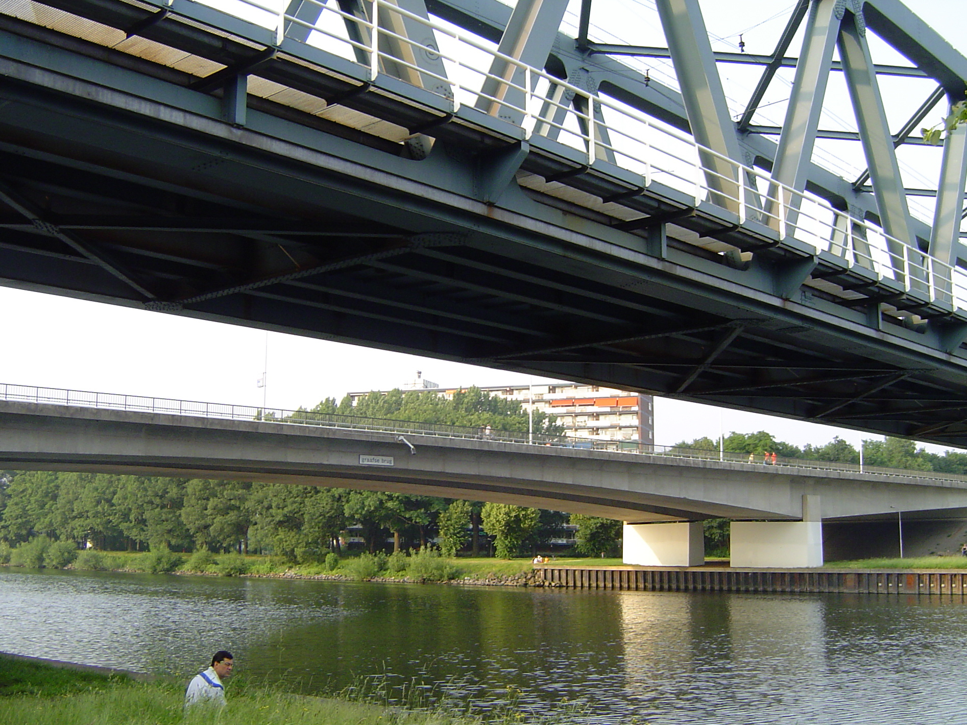 Bruggen Maaswaalkanaal